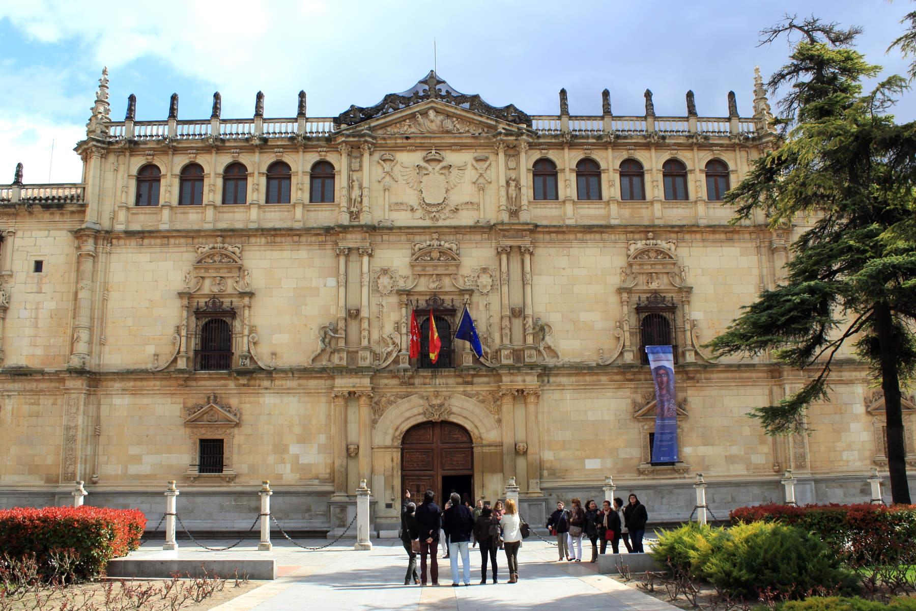 Fachada de la Universidad Complutense Plaza de San Diego Alcalá de Henares Comunidad de Madrid España